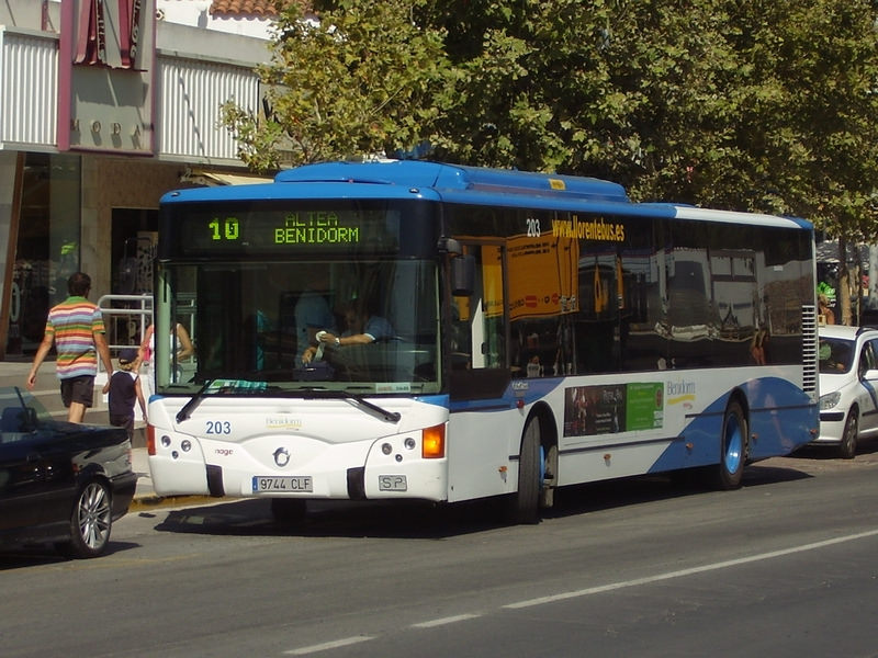 Iveco Cityclass Noge Cittour II L10 → Benidorm Centro C/ El-Albir, l'Alfàs del Pi